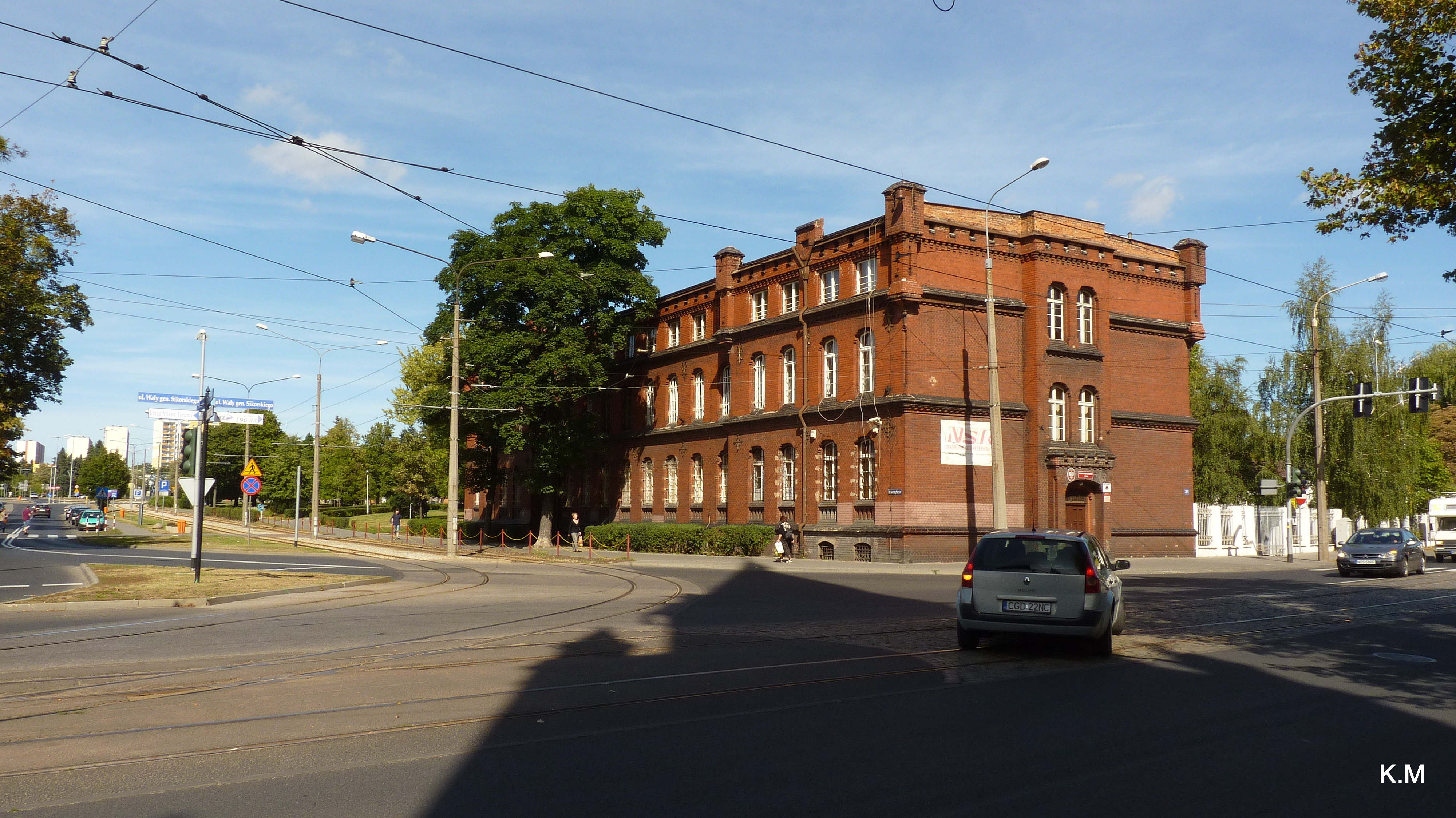 Toruń Zabytkowy budynek przy ulicy Generała Władysława Sikorskiego